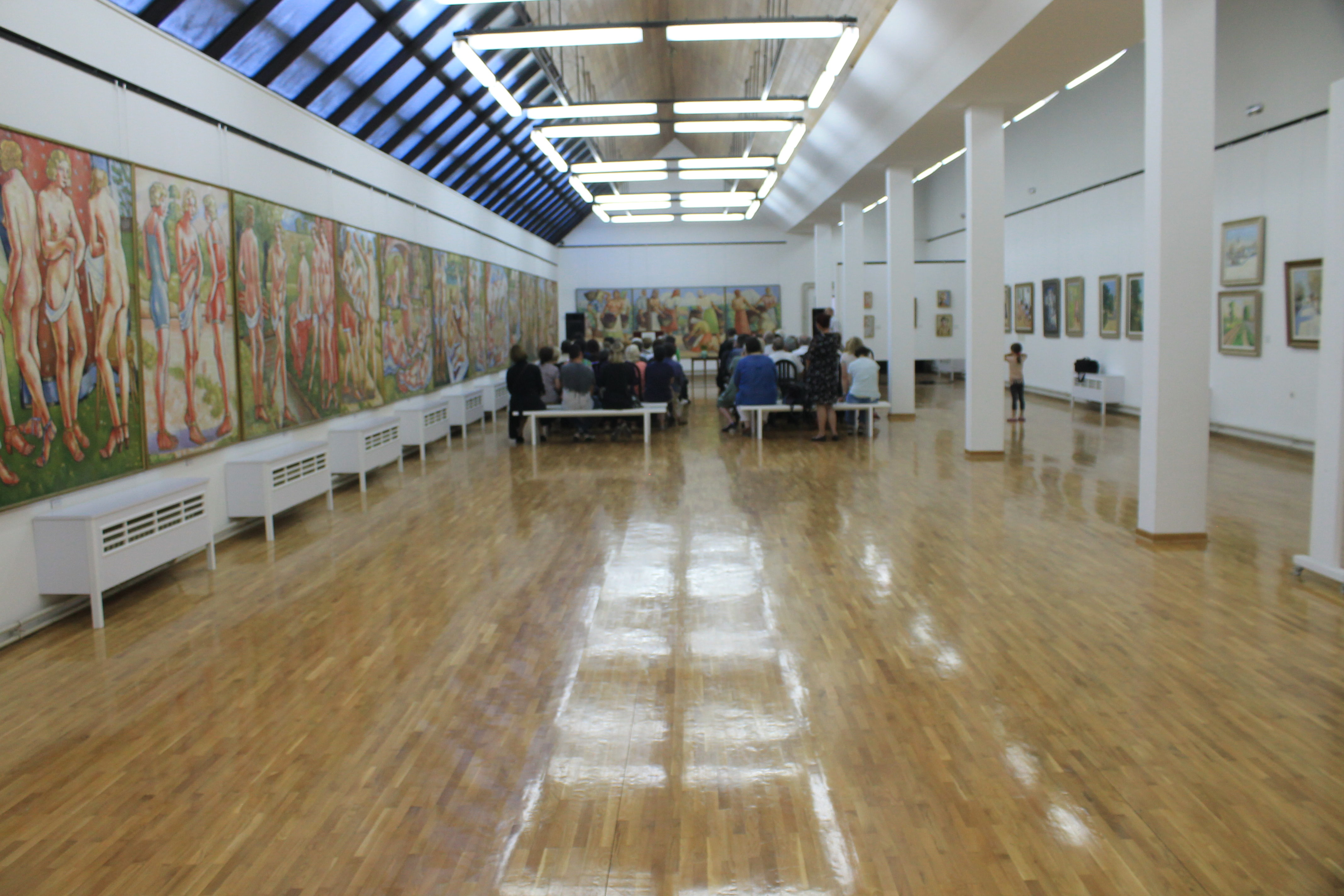 Galerija Sava Šumanović